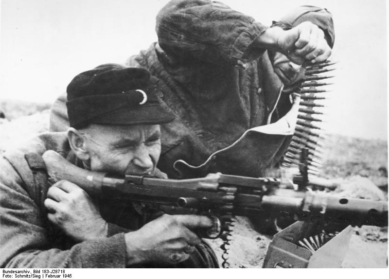 Scherl: Erfolgreicher Abwehrkampf in Schlesien Während ihre Familien mit den großen Trecks nach dem Westen unterwegs sind, haben sich die Volkssturmsoldaten in der Erde ihrer schlesischen Heimat eingegraben, um sie bis zum letzten gegen die Sowjethorden zu verteidigen. PK-Aufnahme Kriegsberichter Schmitz/Sieg. 22.2.1945 [Herausgabedatum] ADN-ZB II. Weltkrieg 1939-45 An der deutsch-sowjetischen Front in Schlesien, Februar 1945: Schlesische Volkssturmmänner machen den aussichtslosen Versuch, die sowjetischen Truppen auf Ihrem Vormarsch aufzuhalten